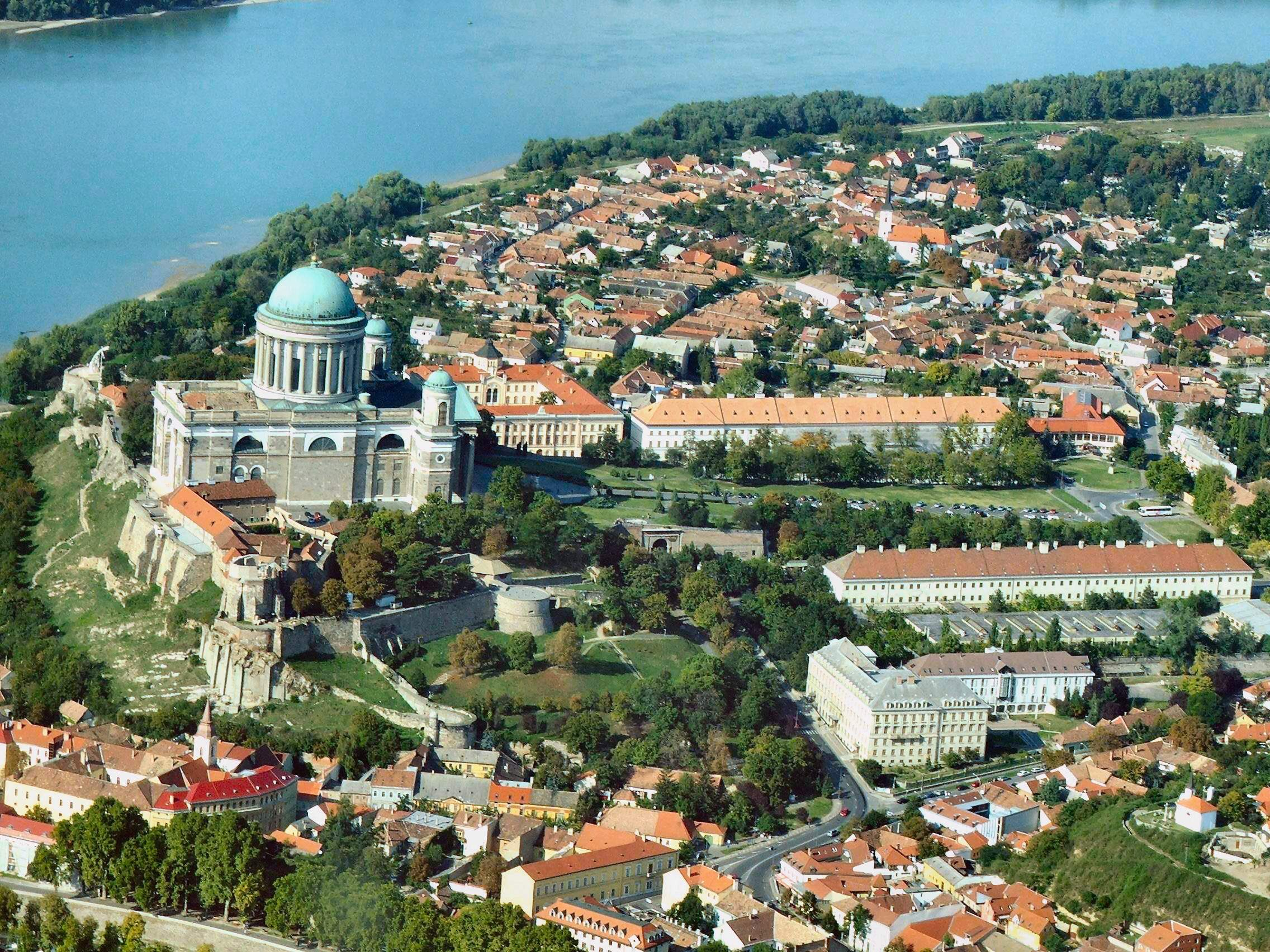 Várhegy, Esztergom